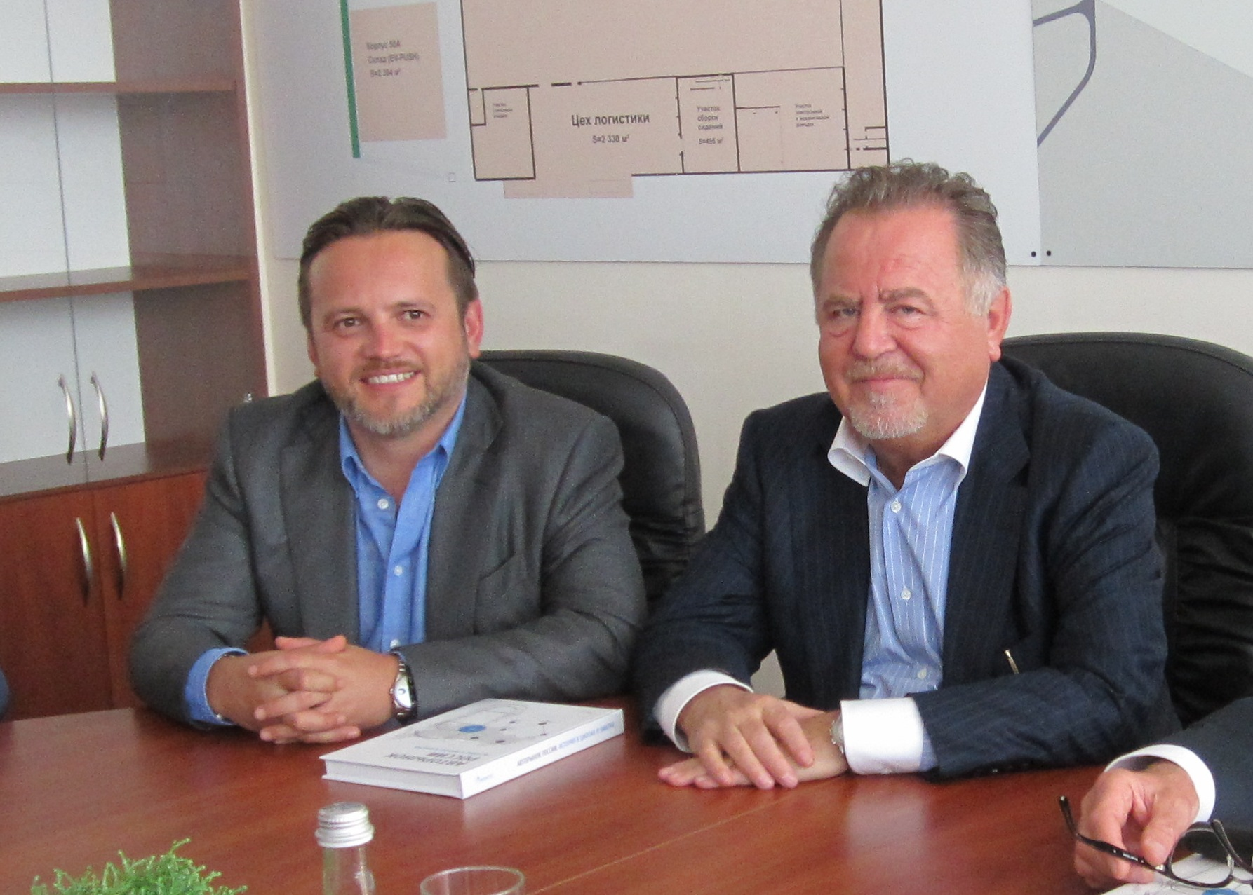 Владимир Иванович Щербаков, российский промышленник с сыном Сергеем